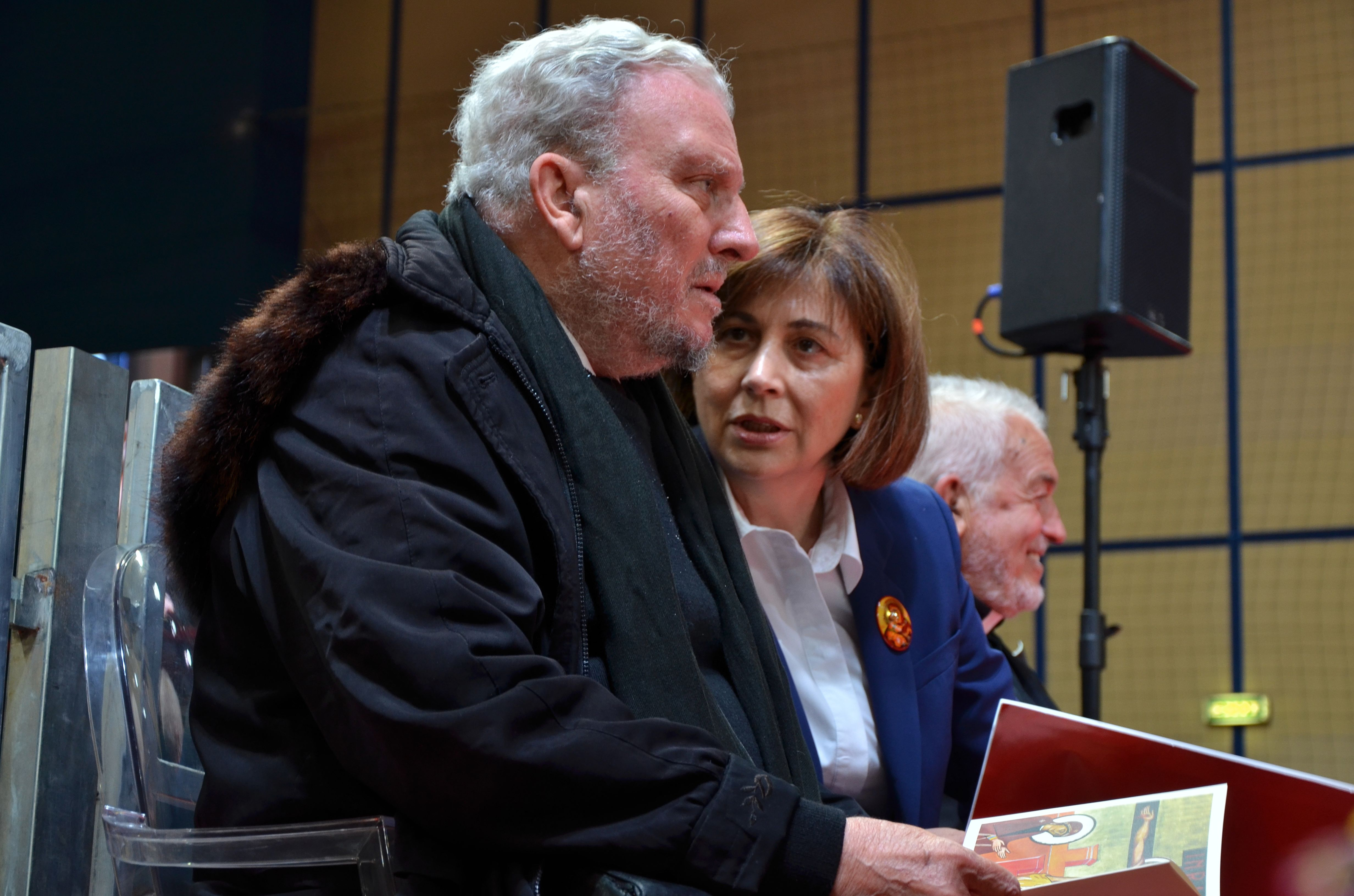 Kiko Argüello e María Ascensión Romero Antón a Bari, in occasione della Sinfonia de "La sofferenza degli innocenti"